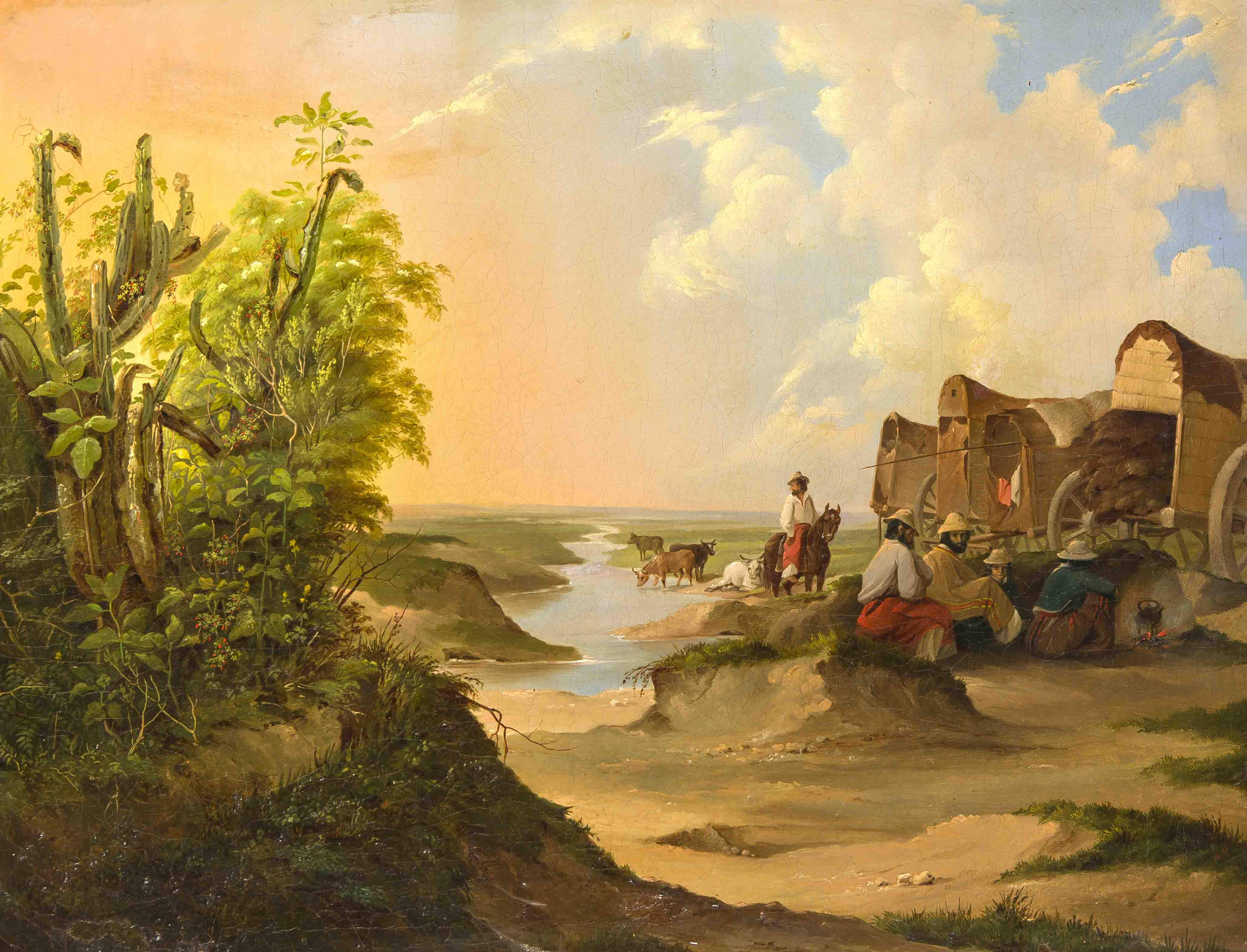 Rastende Viehhirten mit Planwagen, abendlich gestimmte, pittoreske Szene an einem Fluss im Süden der USA bzw. im Norden Mexikos